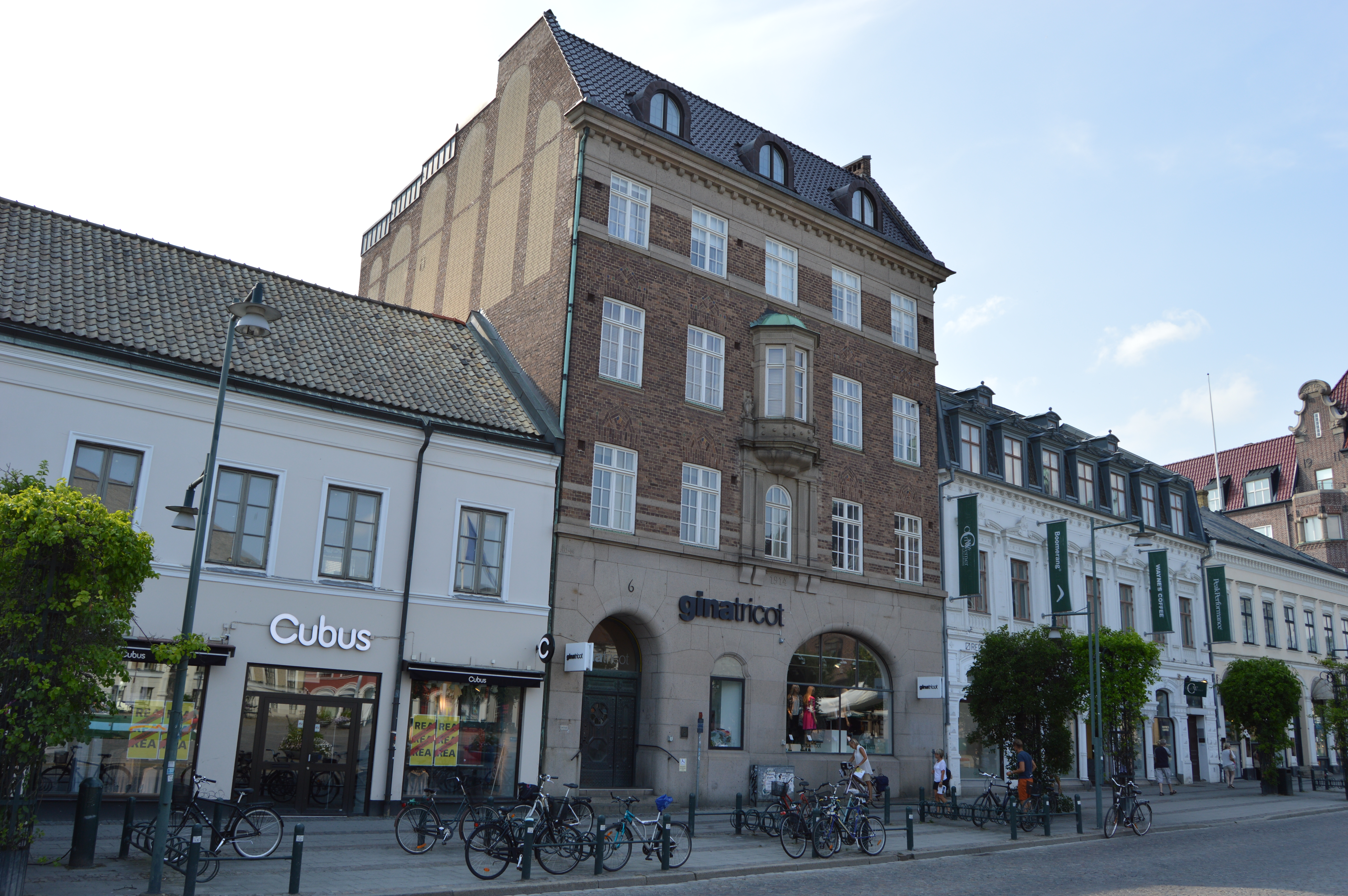 Tidigare huvudkontor för Nya sparbanken i Lund.